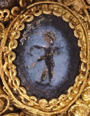 Goldener Ohrschmuck aus Archäologischer Zone Köln